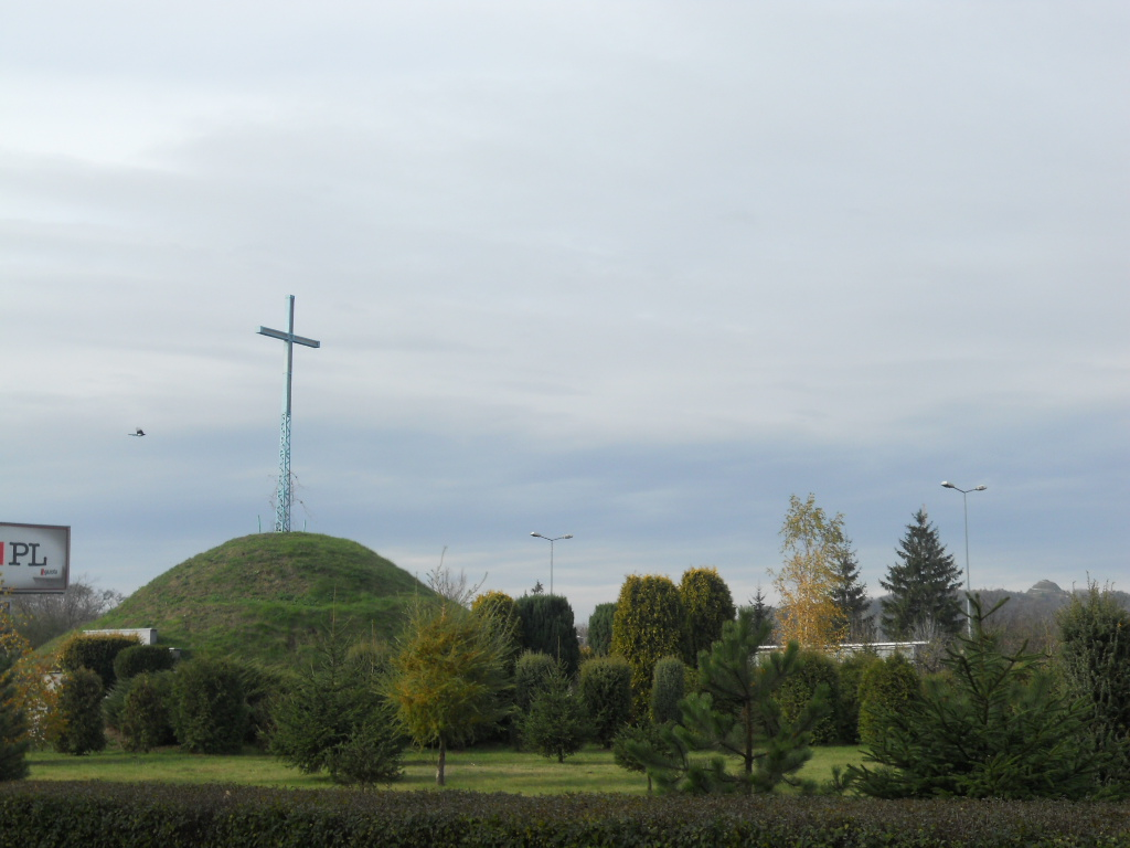 Widok na kopce Jana Pawła II i Kościuszki w Krakowie.